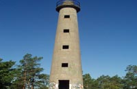 oma valokuva - kirjoittaja